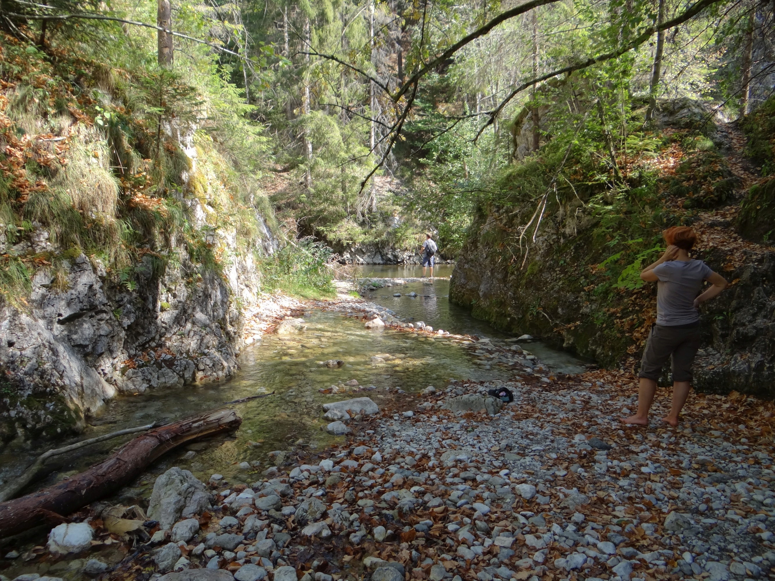 Biely potok (prítok Hornádu